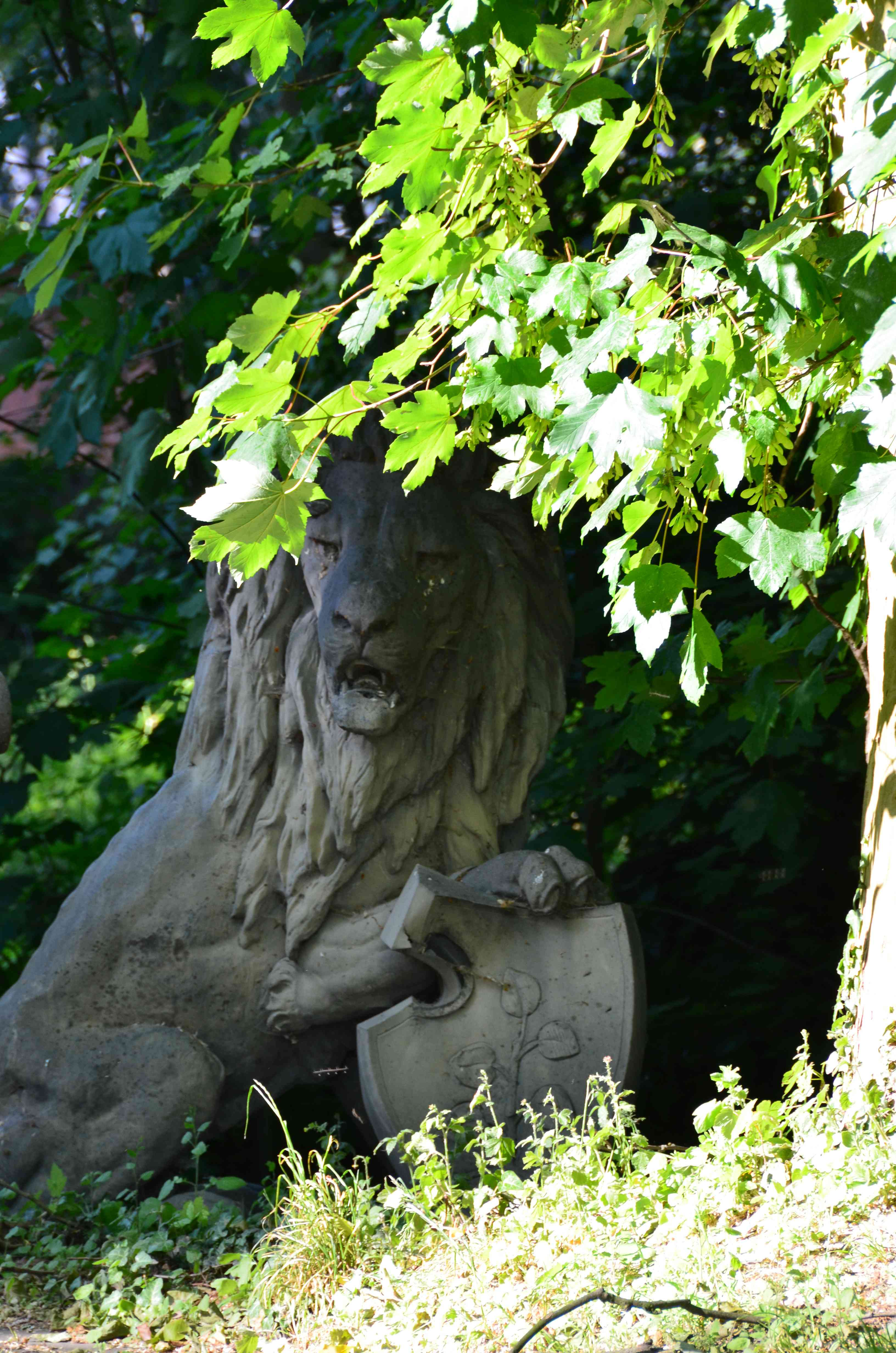 Löwenskulptur im Garten des Sengerhof (Sängerhof); Nähe L 670, vergl. This is a photograph of an architectural monument.